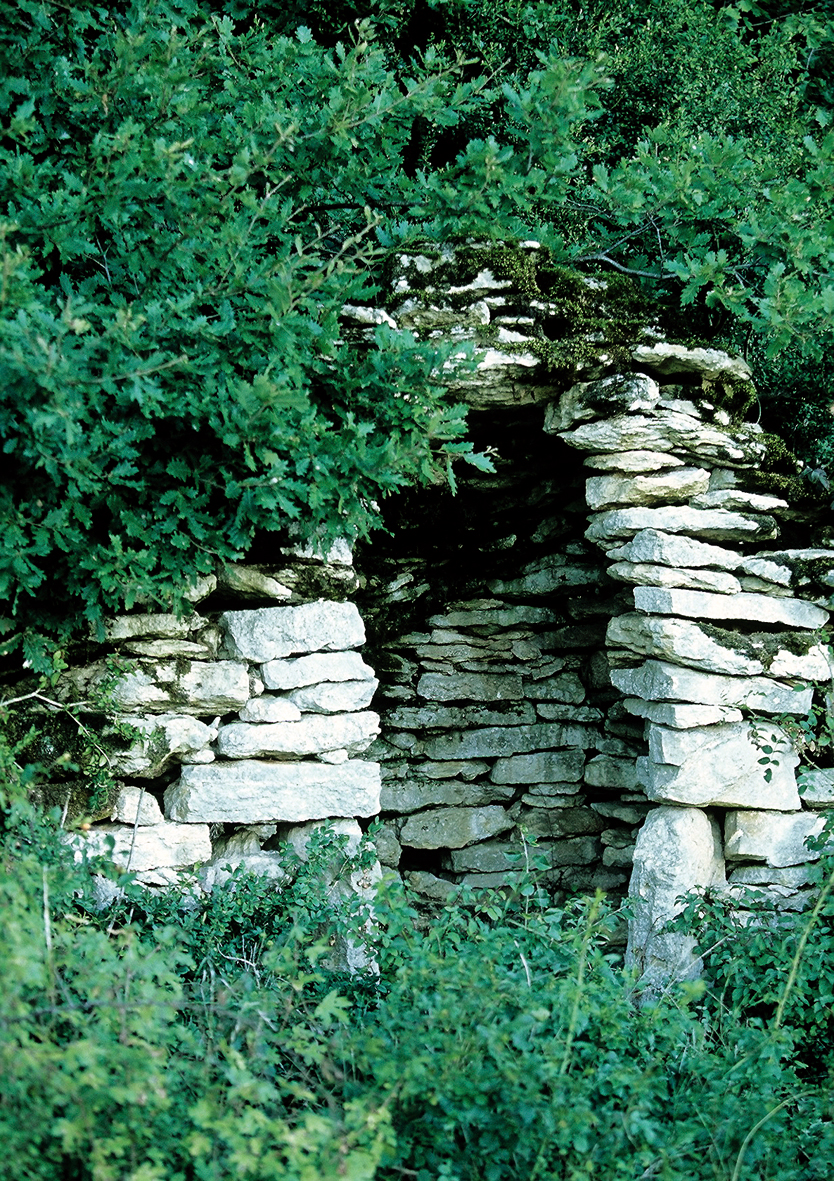 Cadole visible à Lugny, en Mâconnais.